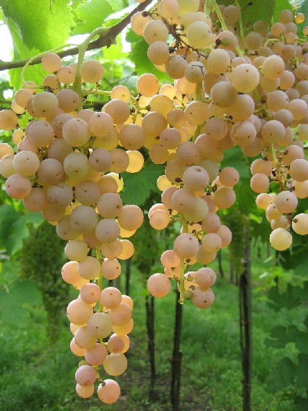 Uva Garganega